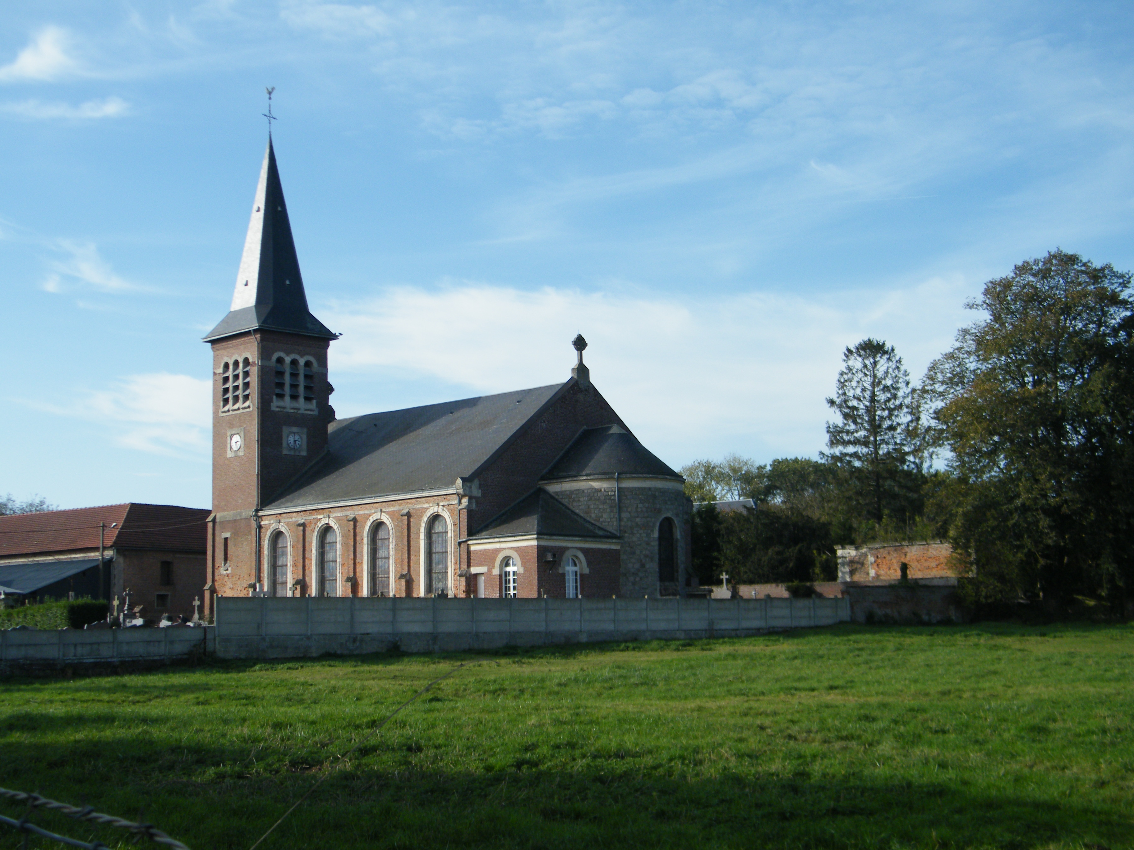 église.